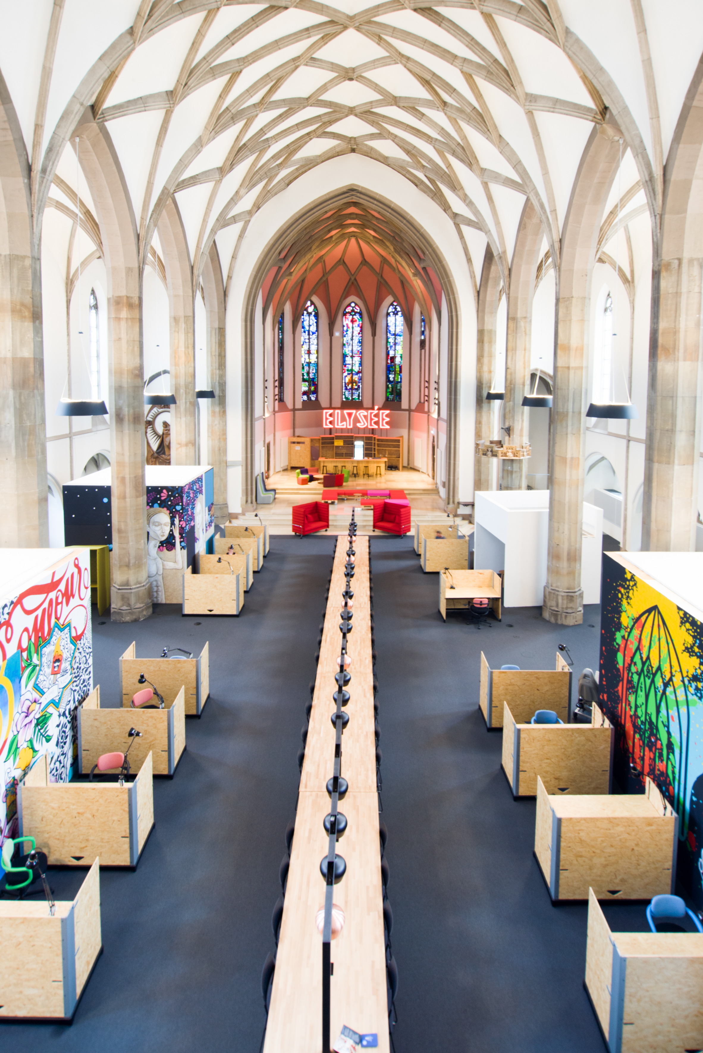 Digital Church von innen